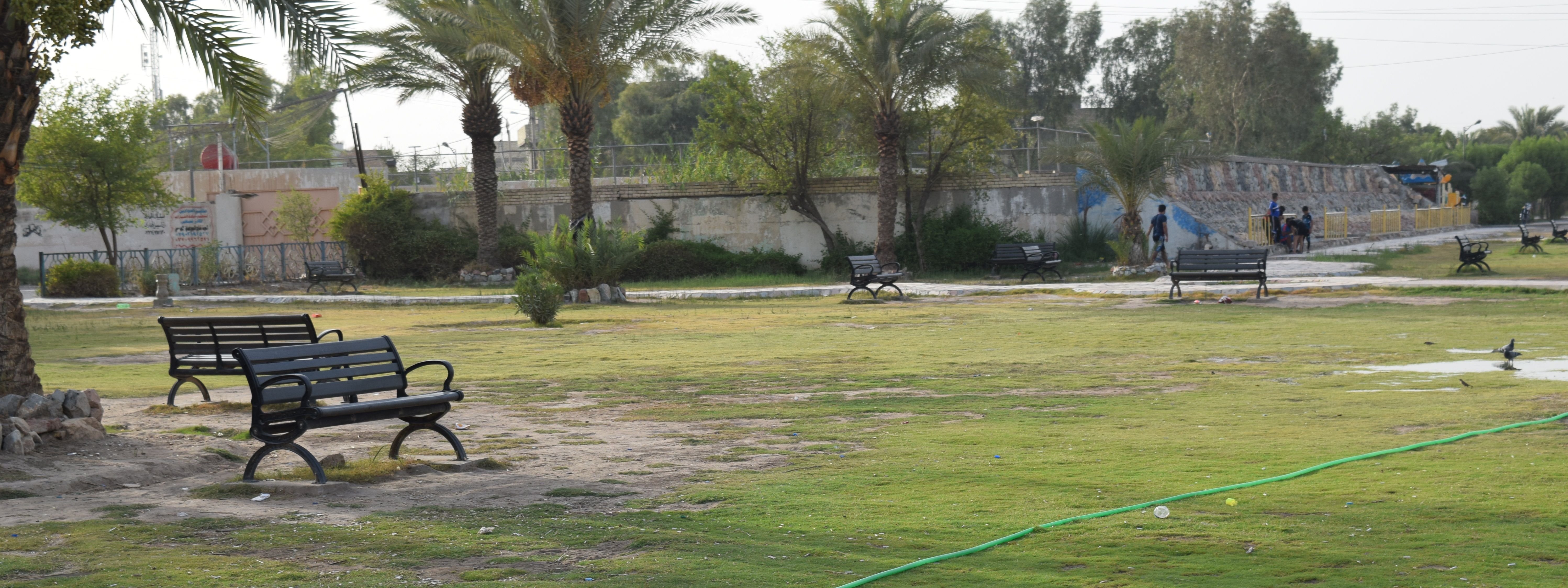 متنزه في مدينة الشعلة، بغداد. العراق